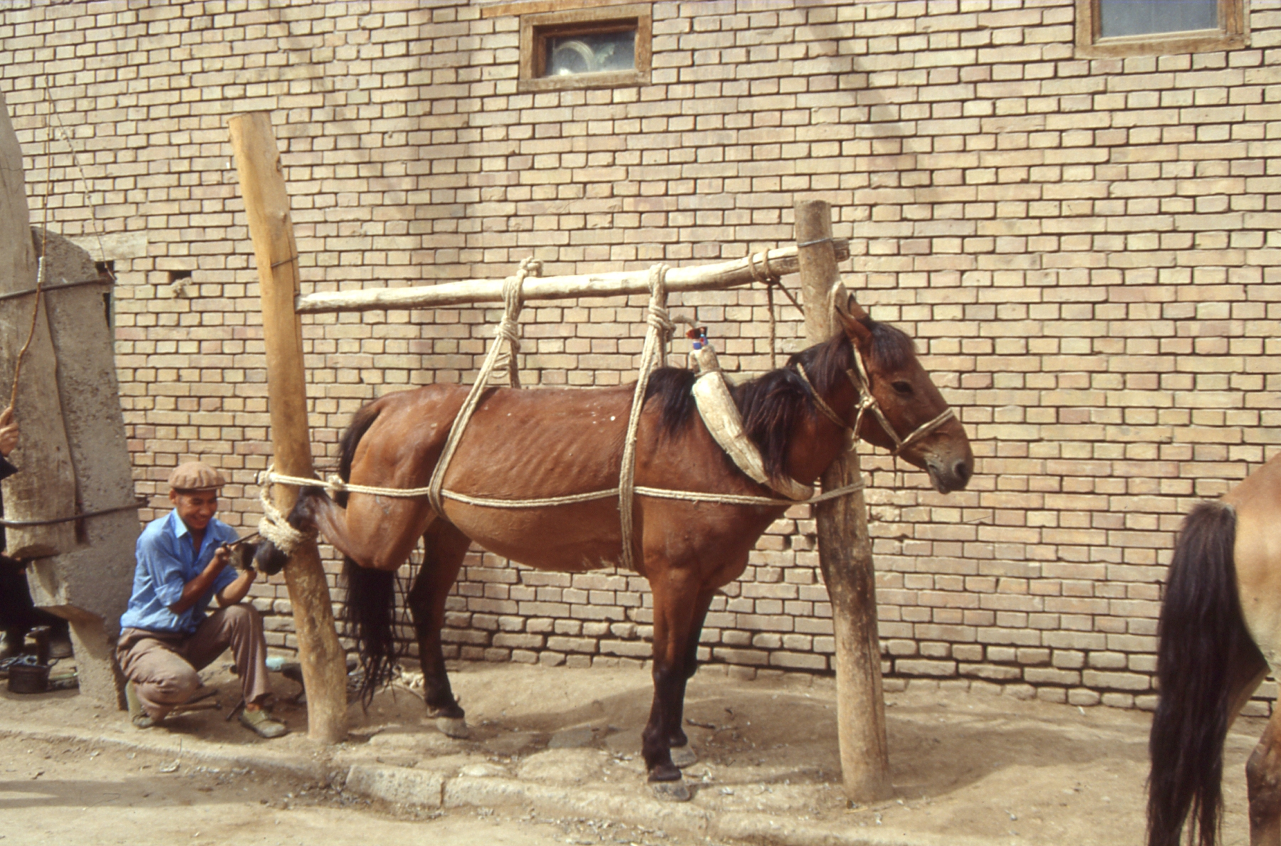 Sunday Market in kashgar